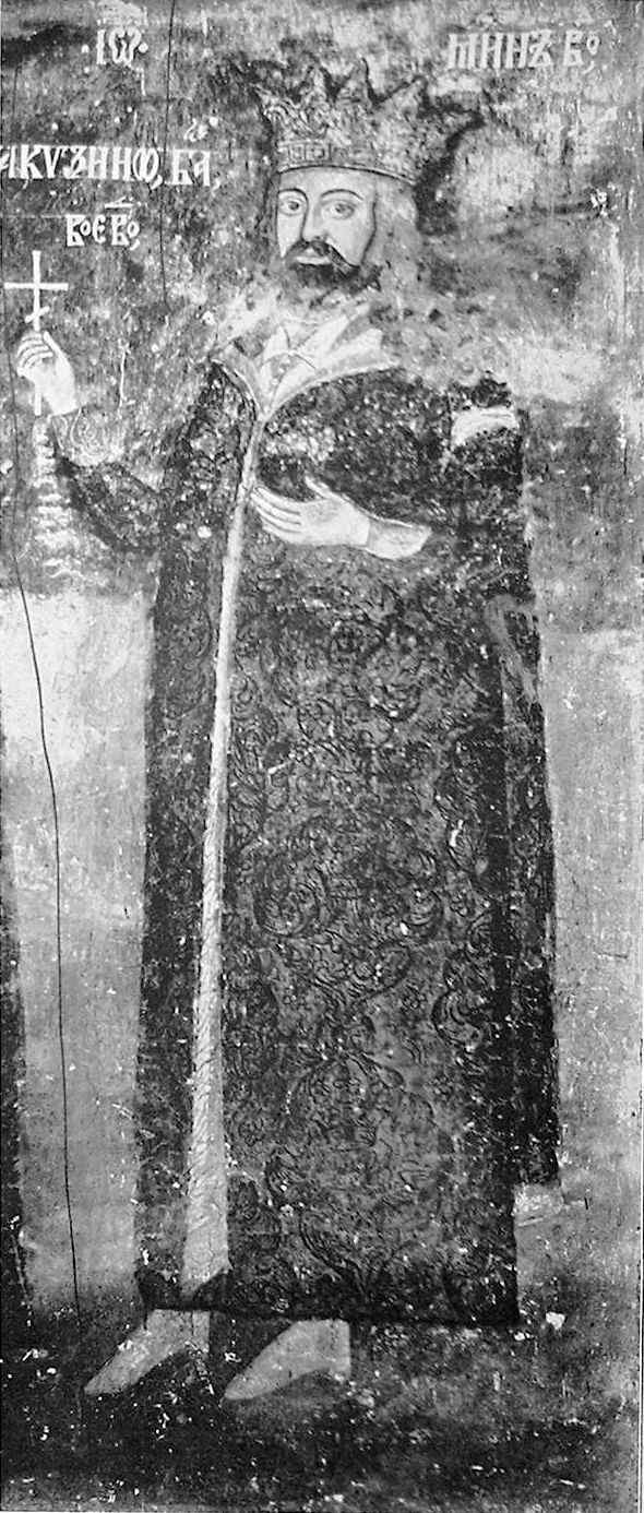 Mihnea Turcitul in Biserica Domnească from Târgovişte